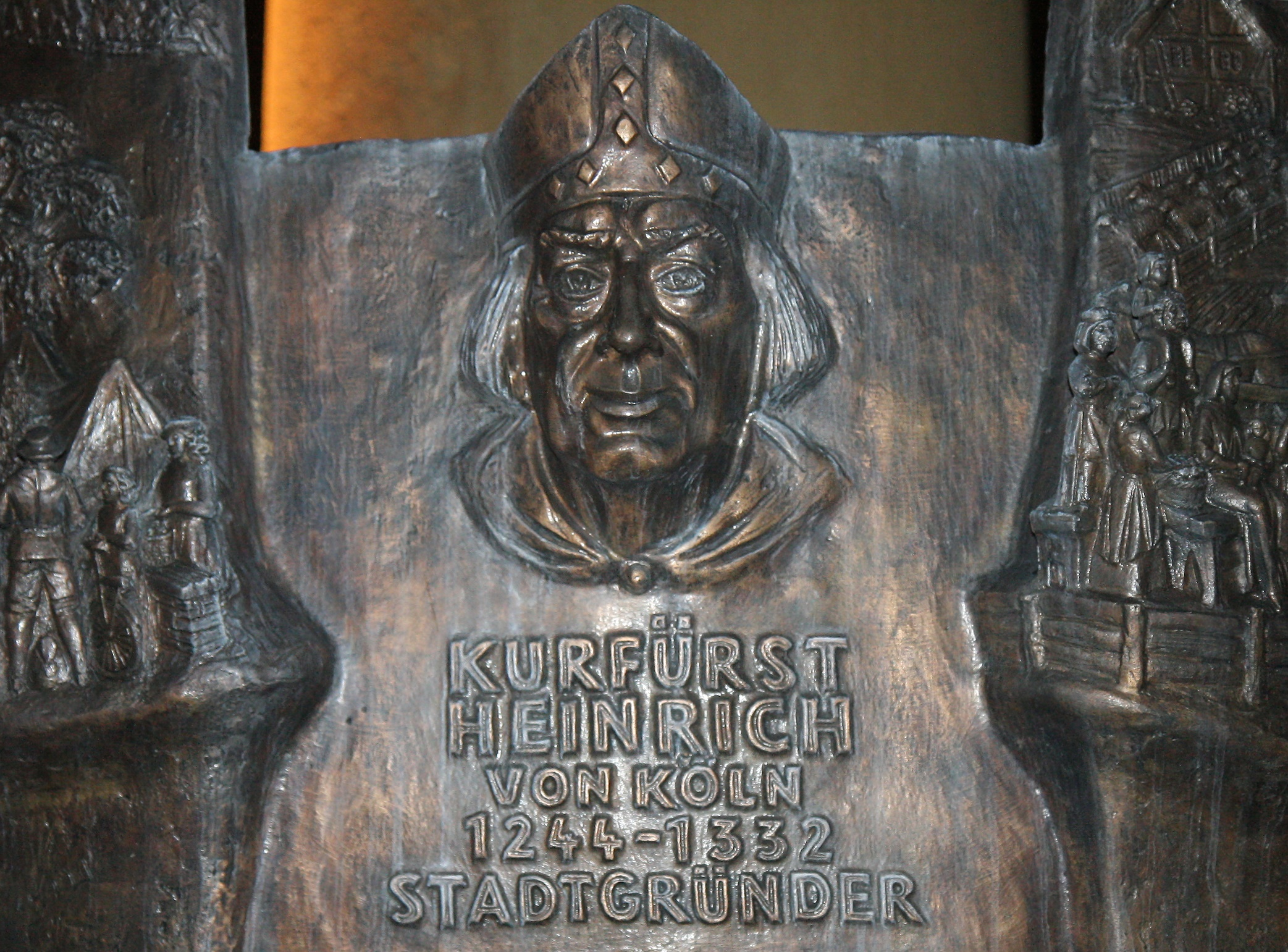 Geschichtsbrunnen am Kurkölner Platz in Olpe. Relief Kurfürst Heinrich von Köln (Heinrich II. von Virneburg).